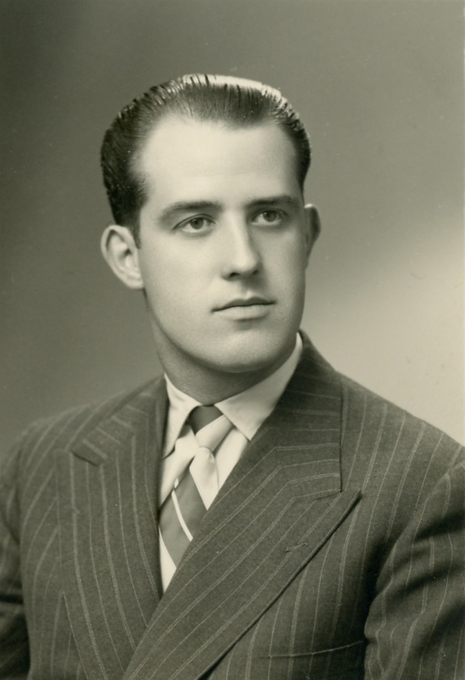 Fotografía del entonces capitán José Rodrigo.